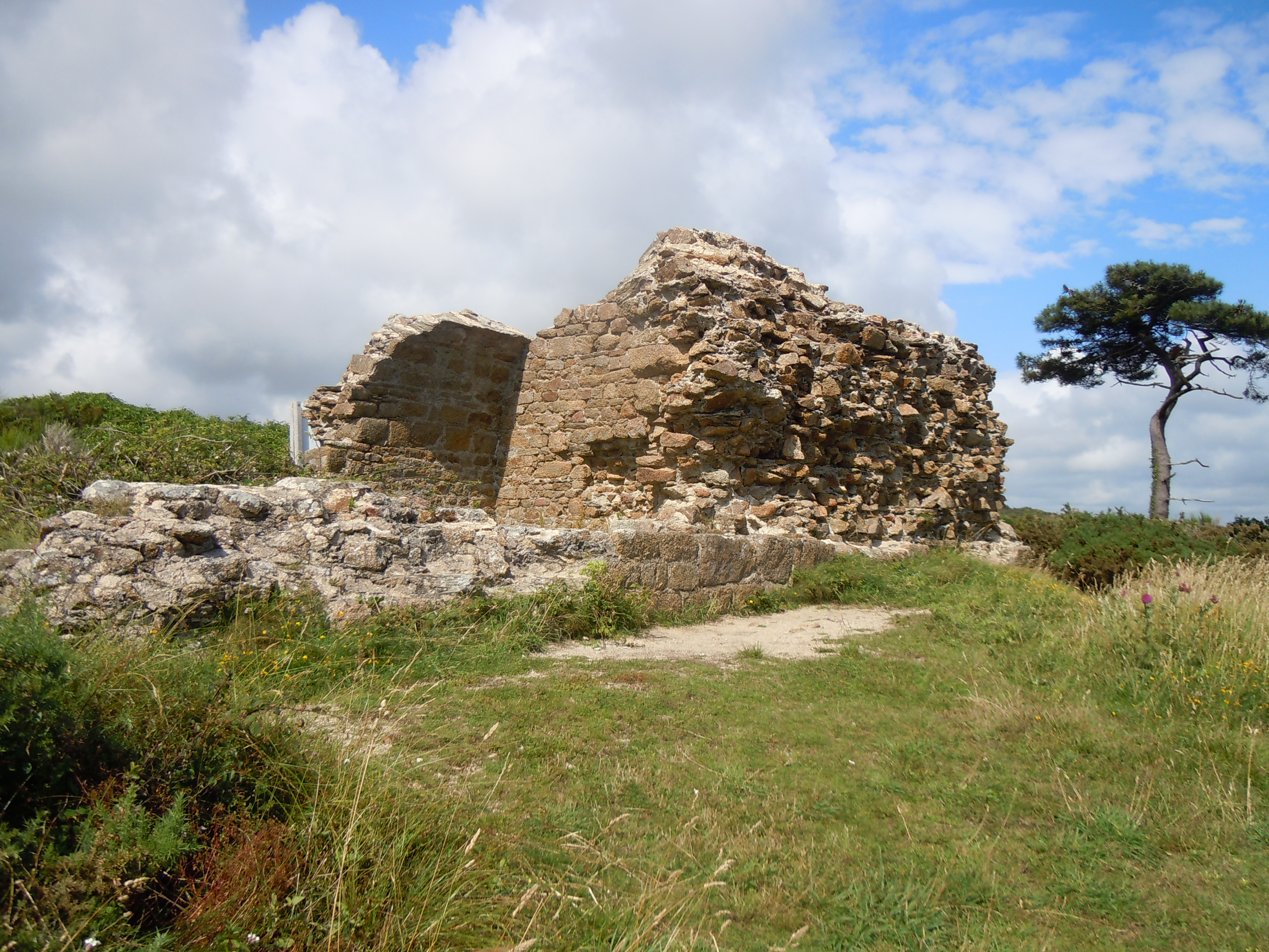 vestiges de l'ancien fort du Bélon qui commandait l'accès aux rivières du Bélon et de l'Aven (1678)